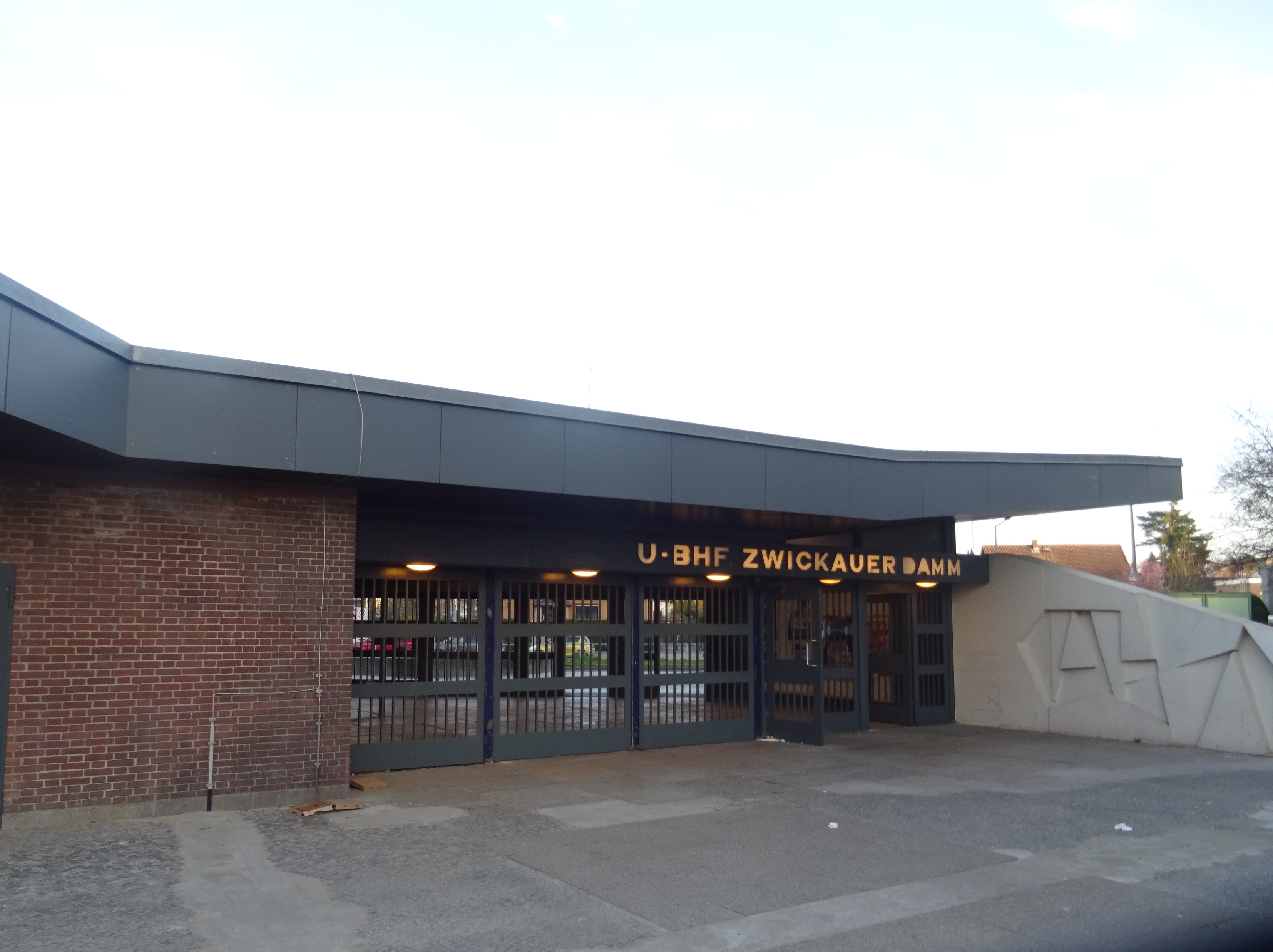 Zugangsbauwerk des U-Bahnhofs Zwickauer Damm, von Nordwesten